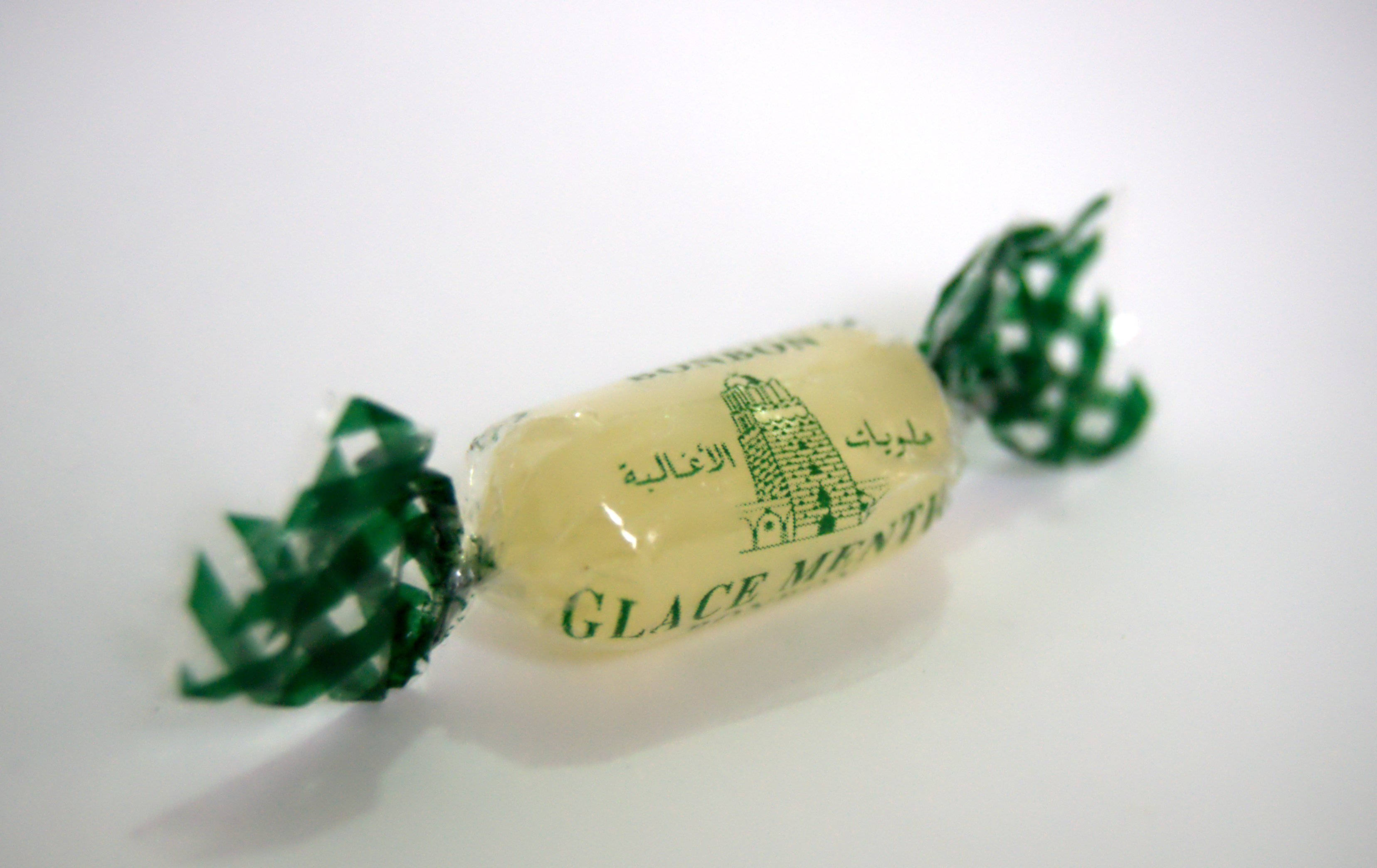 Bonbon au goût glace menthe poivrée de Tunisie